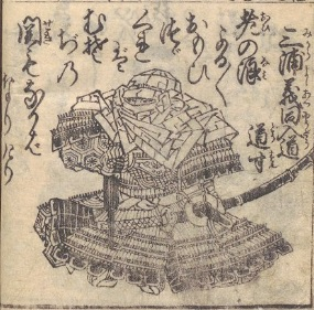 三浦義同